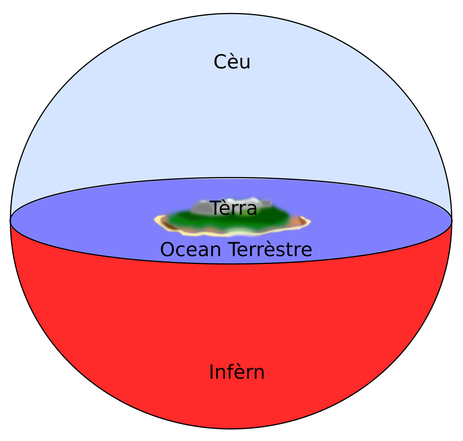 Modèl d'Univèrs dau periòde mesopotamian antic.